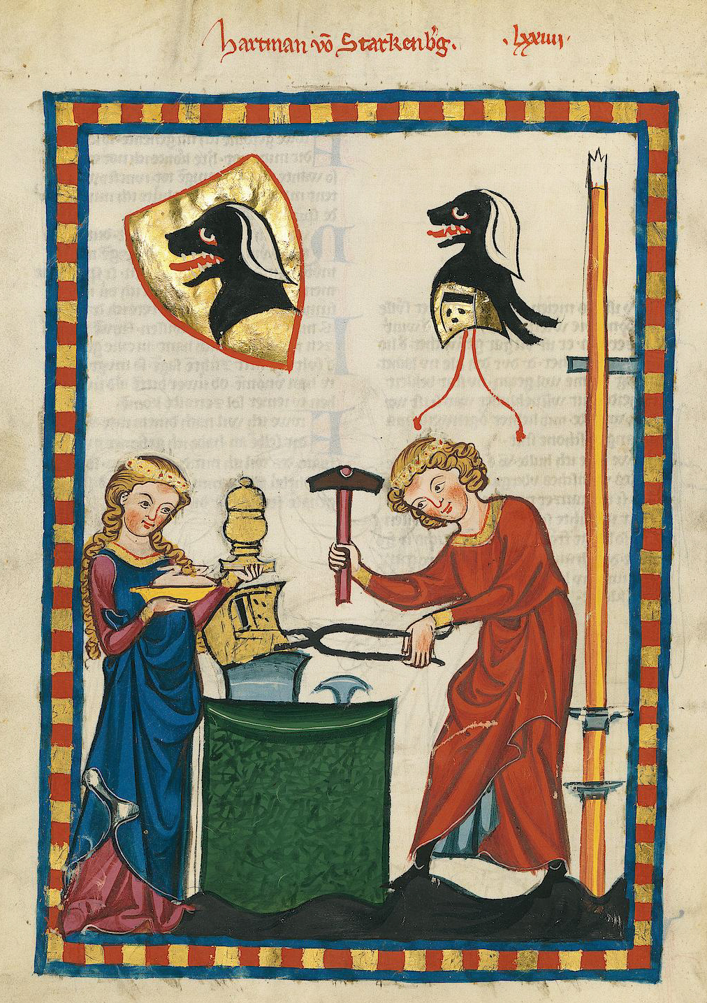 Codex Manesse, UB Heidelberg, Cod. Pal. germ. 848, fol. 256v: Hartmann von Starkenberg